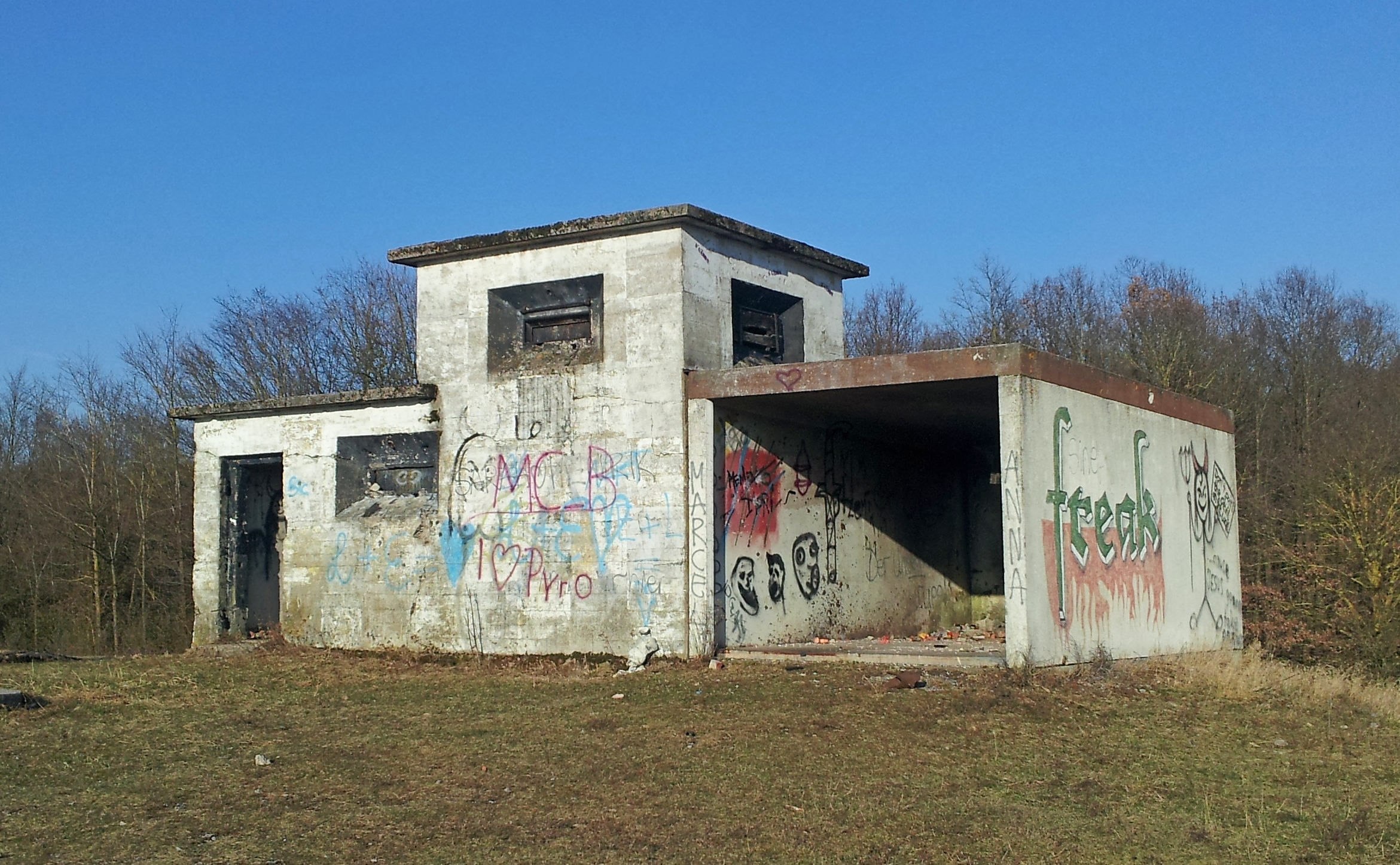 Beobachtungsposten auf dem für Bombenabwürfe genutzten Übungsplatz Sulzheim. Die Garage auf der rechten Seite dürfte in den 1980ern angebaut worden sein. Das Bild entstand wenige Tage bevor der Landkreis ein Betretungsverbot für das Areal erlassen hat, nachdem dort noch Reste von Kampfmitteln gefunden wurden.